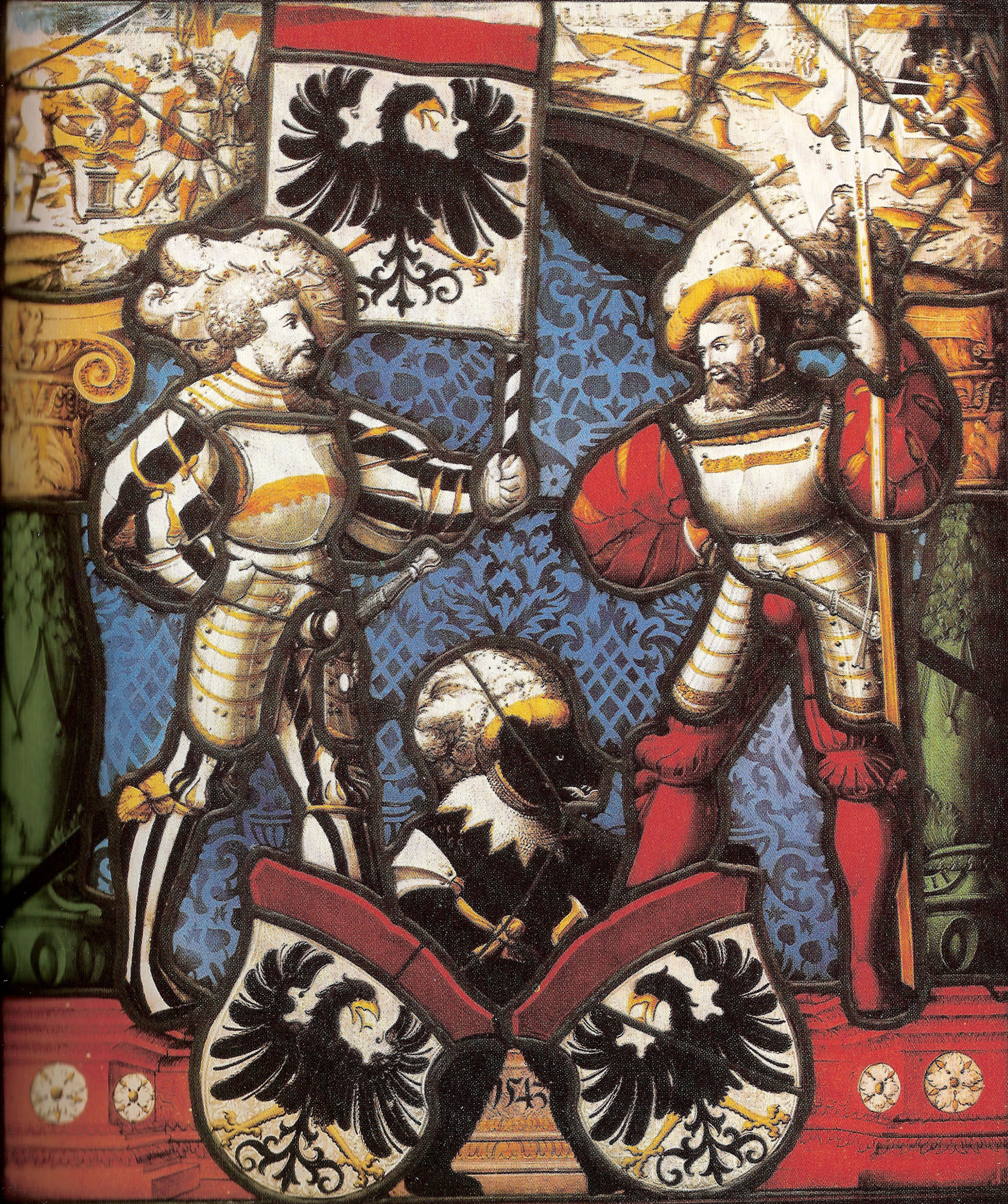 Wappenscheibe der Stadt Aarau aus dem Jahr 1543. Standort: Rathaus von Stein am Rhein.